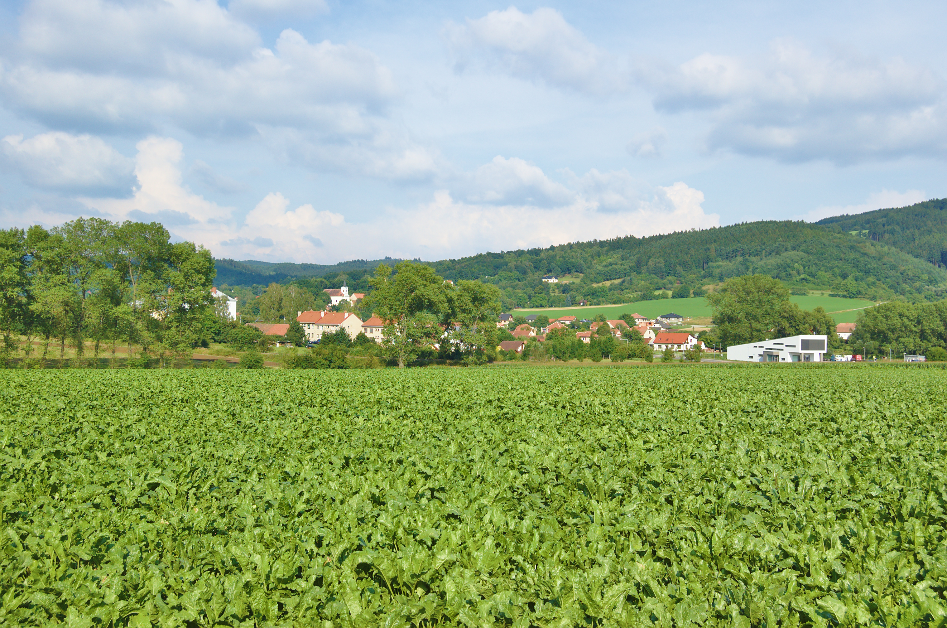 Pohled na obec od západu, Knínice u Boskovic, okres Blansko